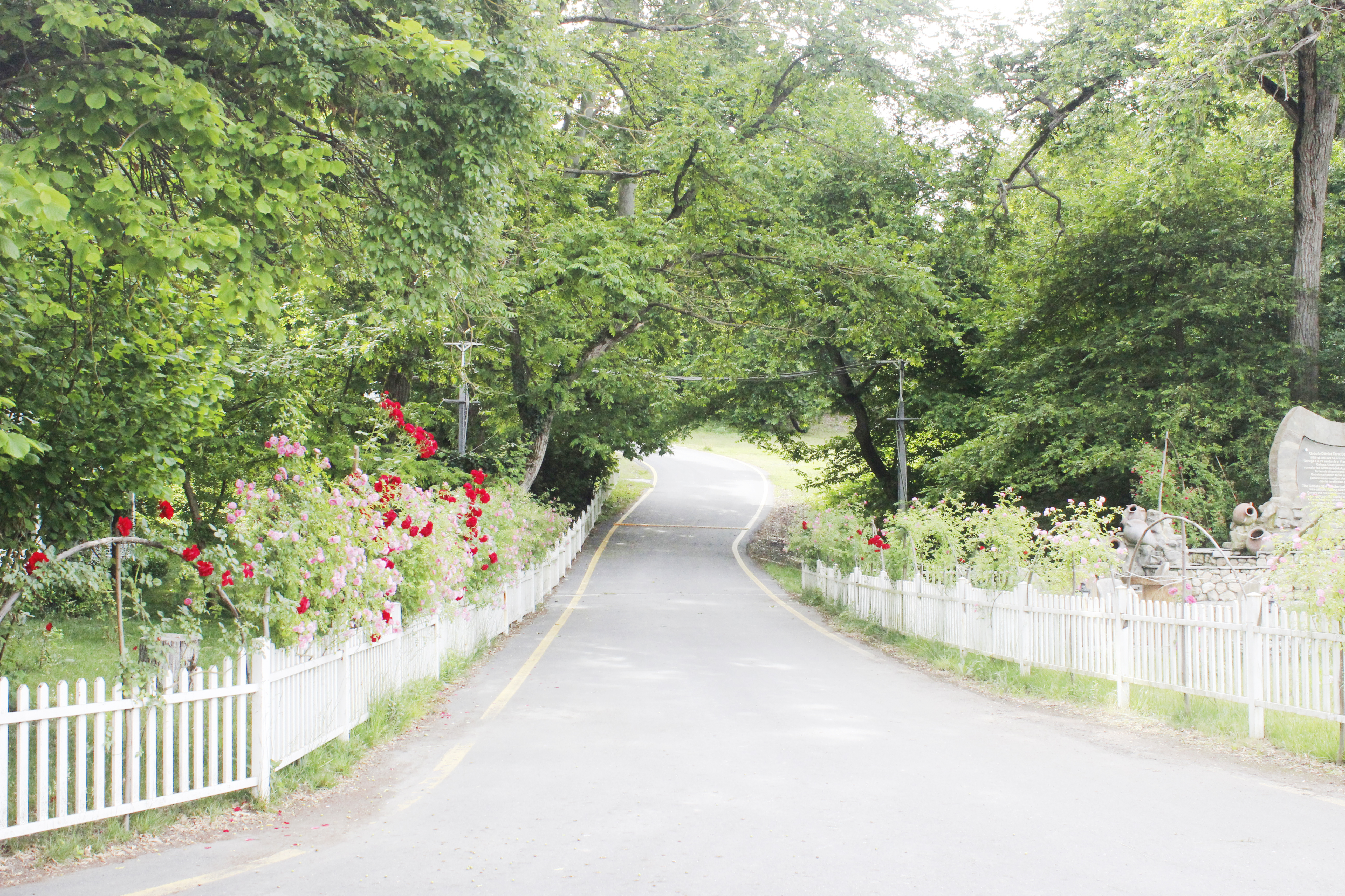 Qəbələ Dövlət Təbiət Yasaqlığı